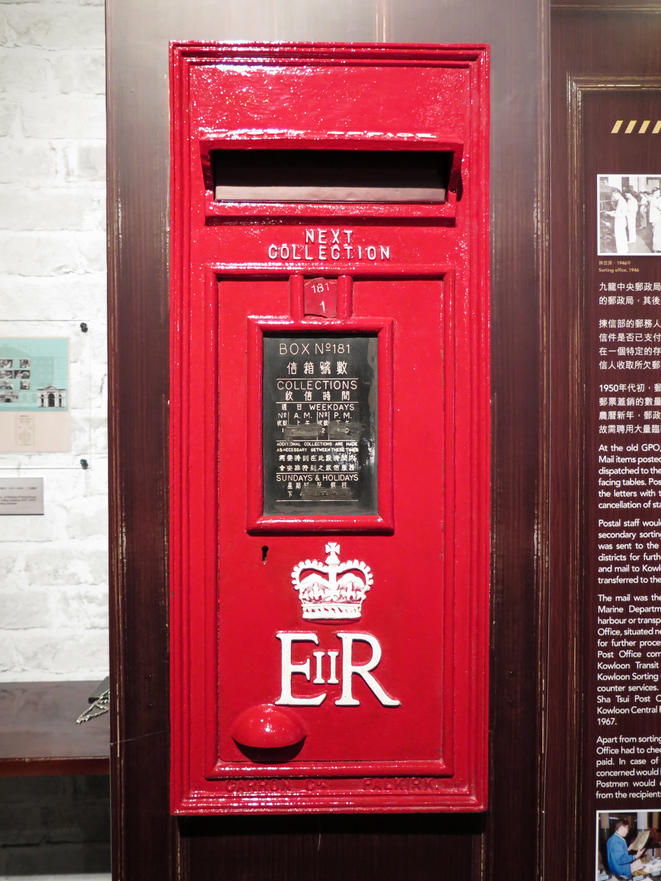 Old mail box in Hong Kong